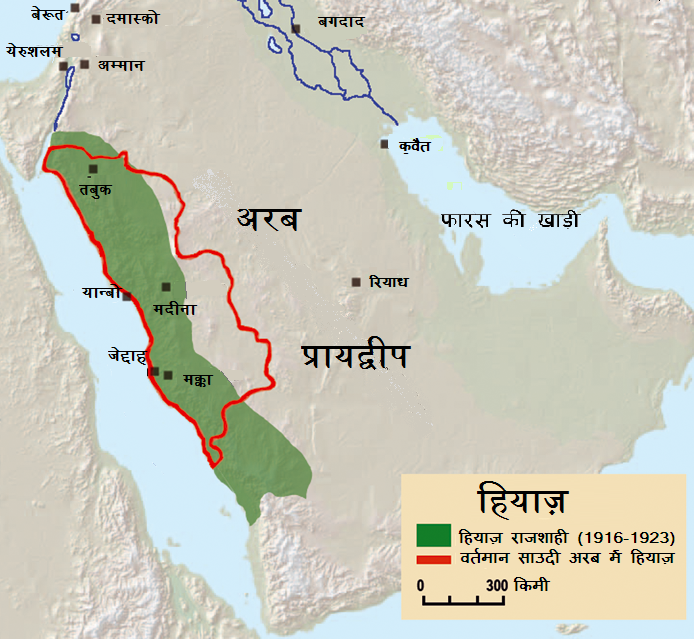 Hijaz hindi